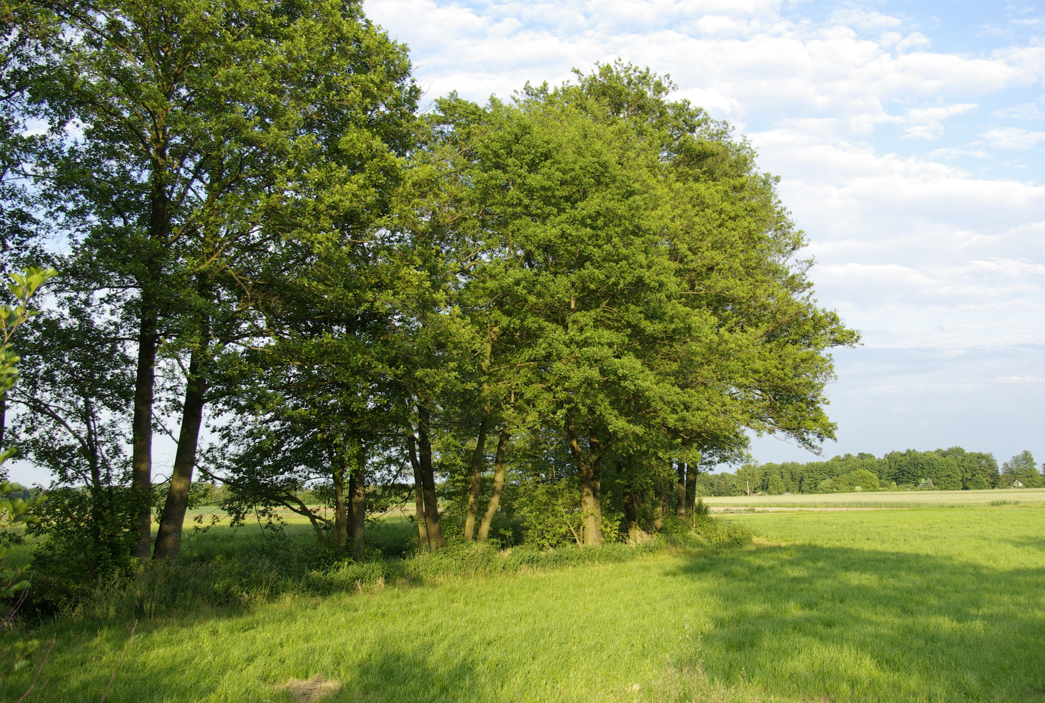 Das Landschaftsschutzgebiet Gründlachtal - Ost nordwestlich des Nürnberger Stadtteils Neunhof.